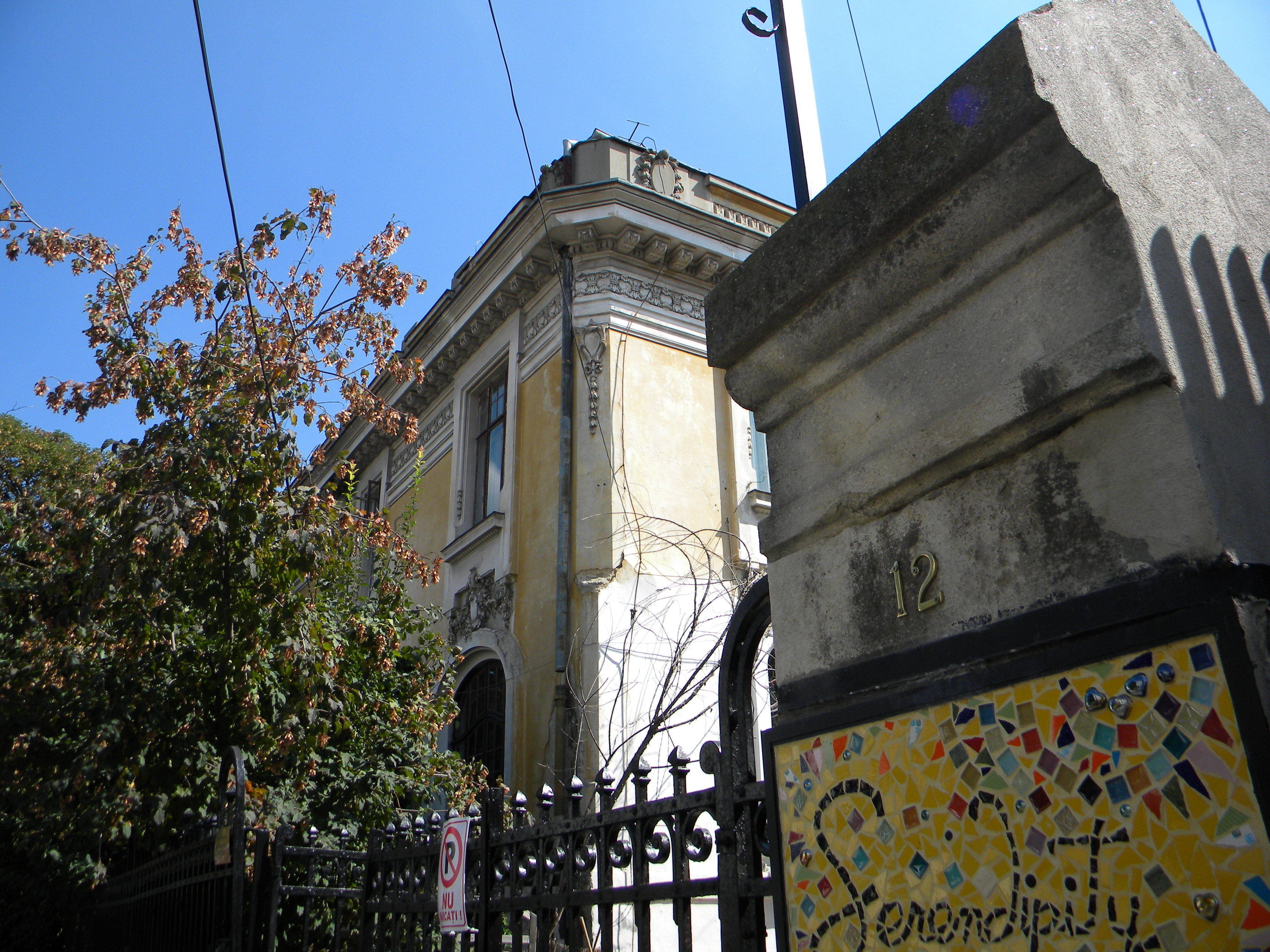 Casa pe Str. Dumbrava Rosie nr. 12, Bucuresti sect. 2